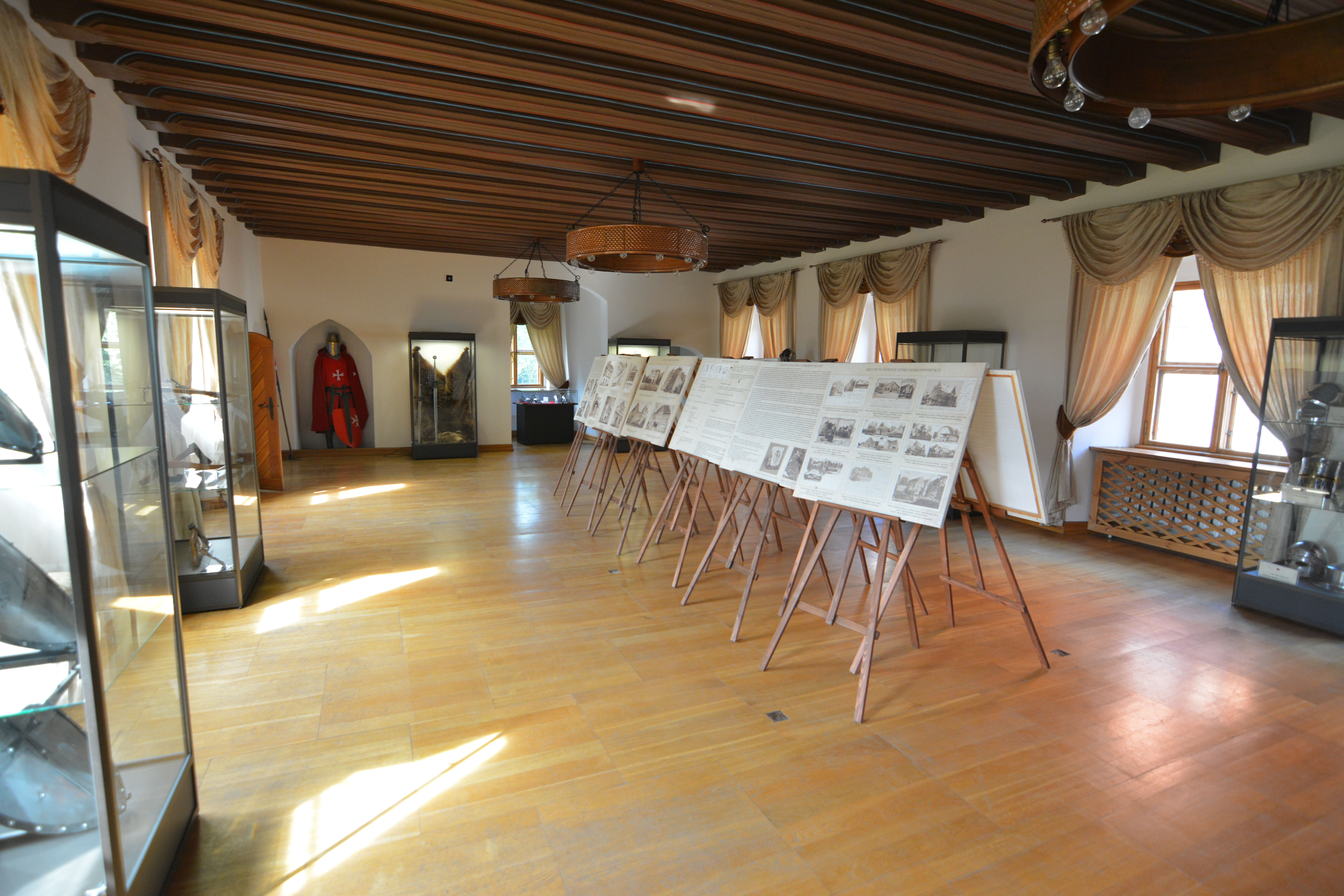 Pęzino - zamek, XIV, 1 poł. XVI, 1600, XIX